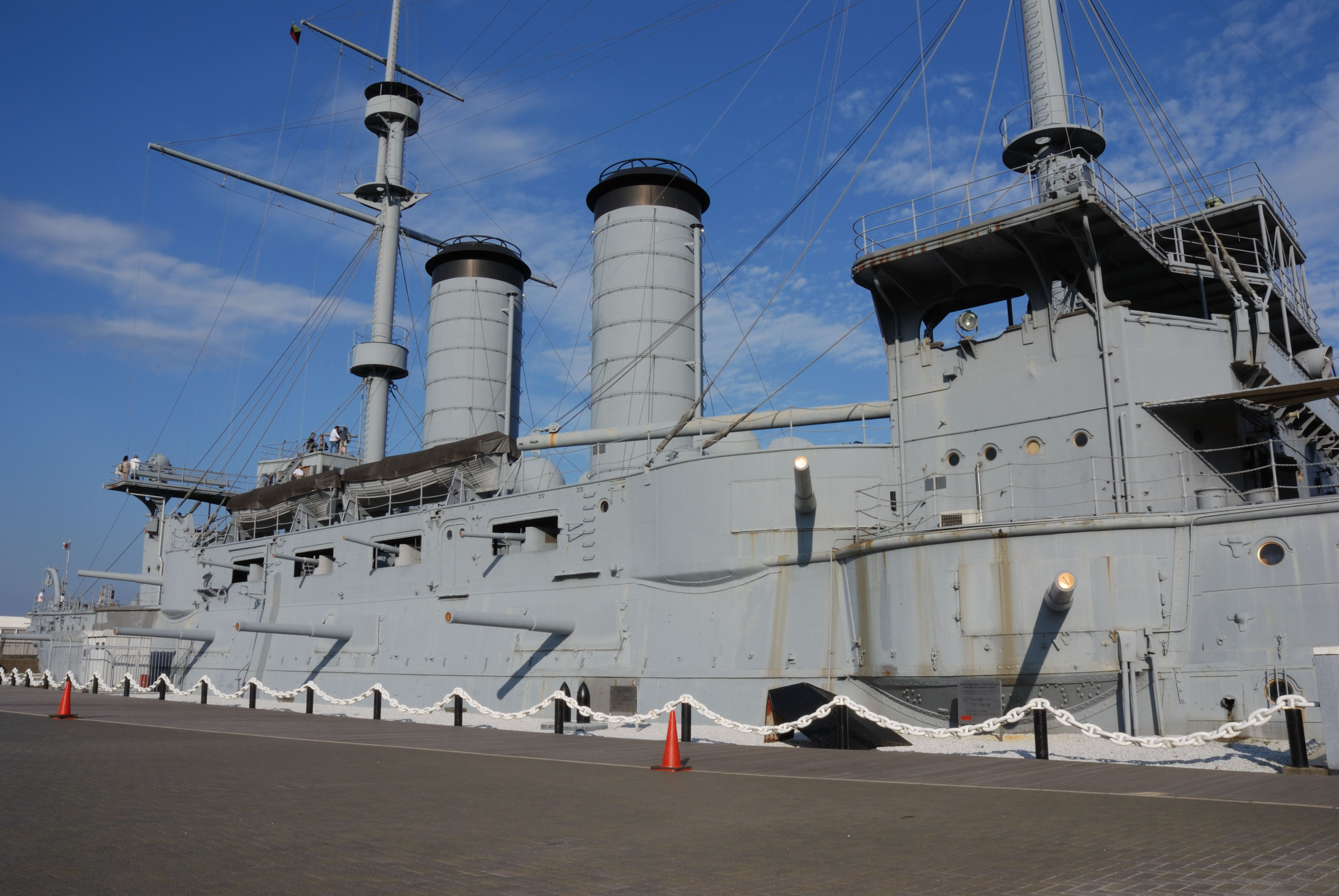 Mikasa fukuho